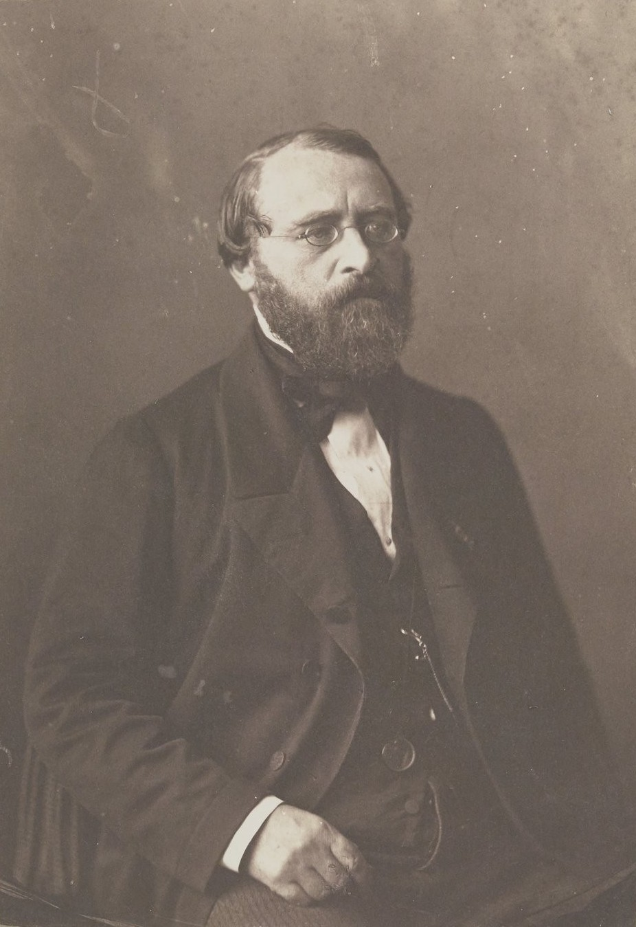 Henri Baudrillart par Félix Nadar